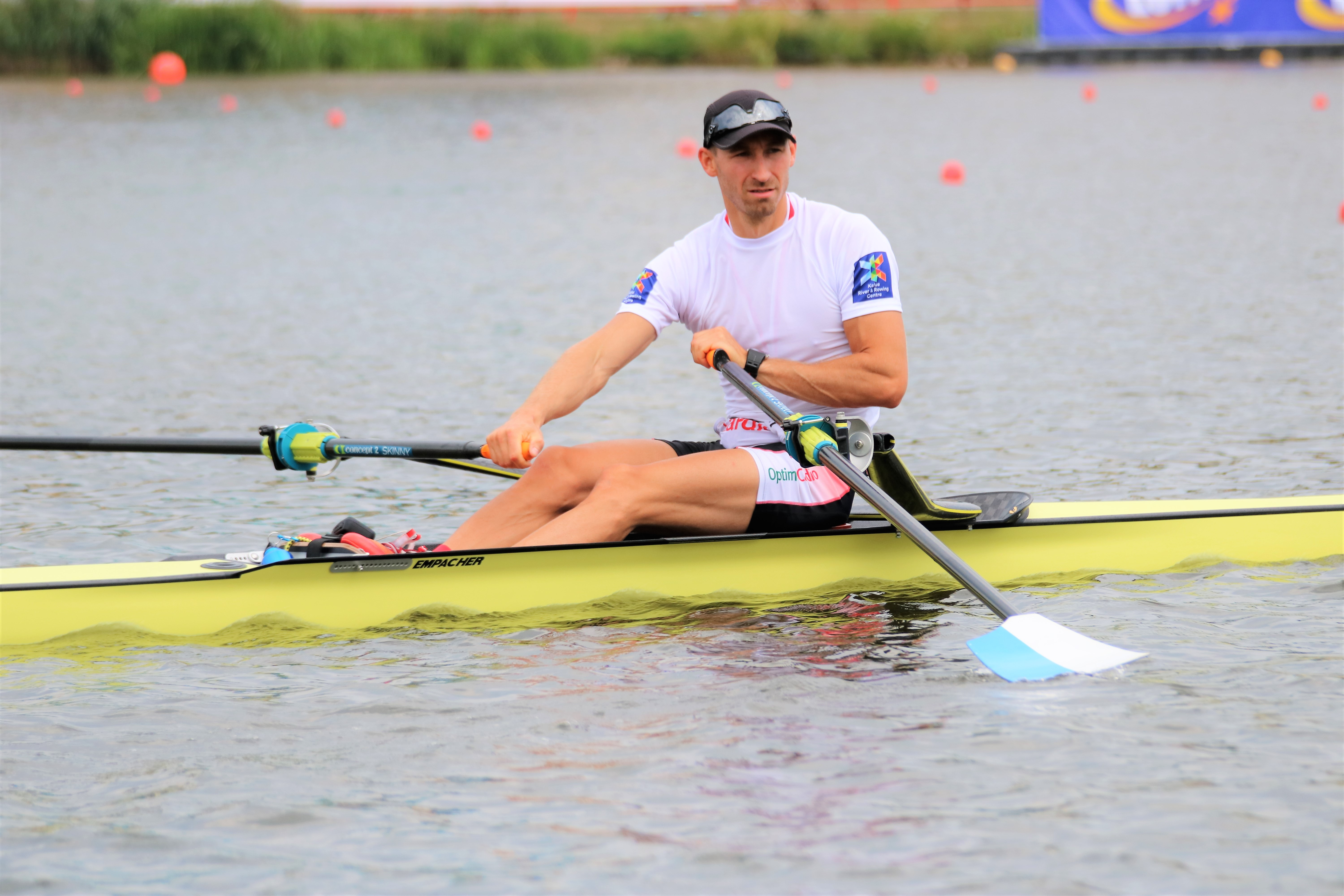 Mistrzostwa Polski Seniorów, Poznań (10.06.2018) złoty medalista biegu 1xML Gopło Kruszwica (J. Kowalski)